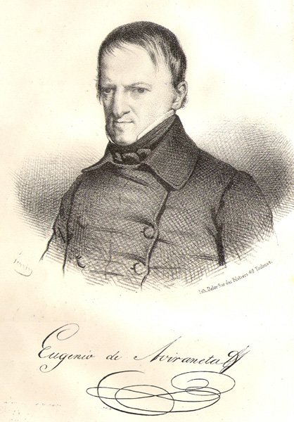 Retrato de Eugenio de Aviraneta y facsímil de la firma, litografía publicada con la Memoria dirigida al Gobierno español, Imprenta D'Aug Renault, Tolosa, 1841 Museo Zumalakarregi.